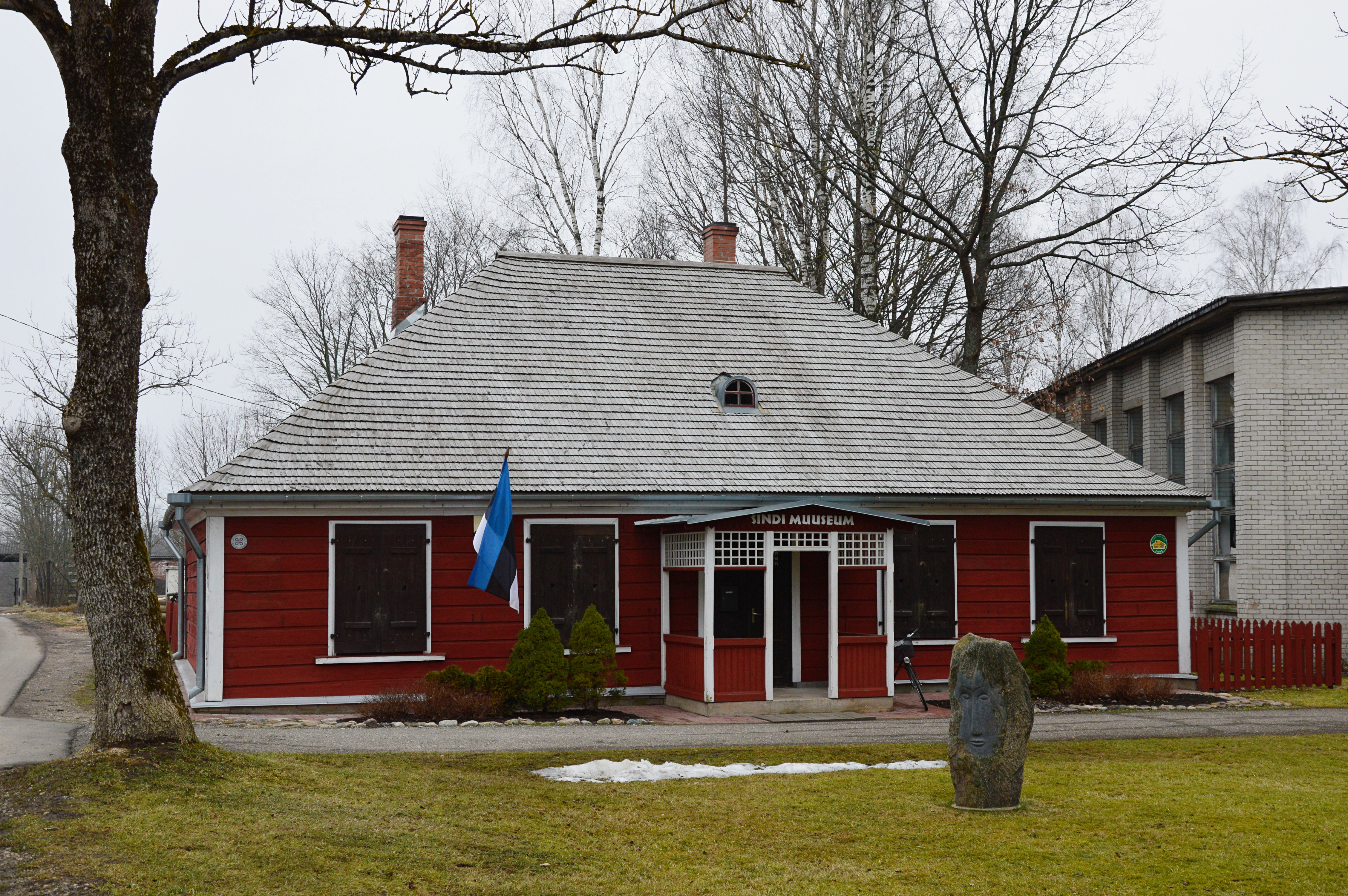 Sindi Muuseum.